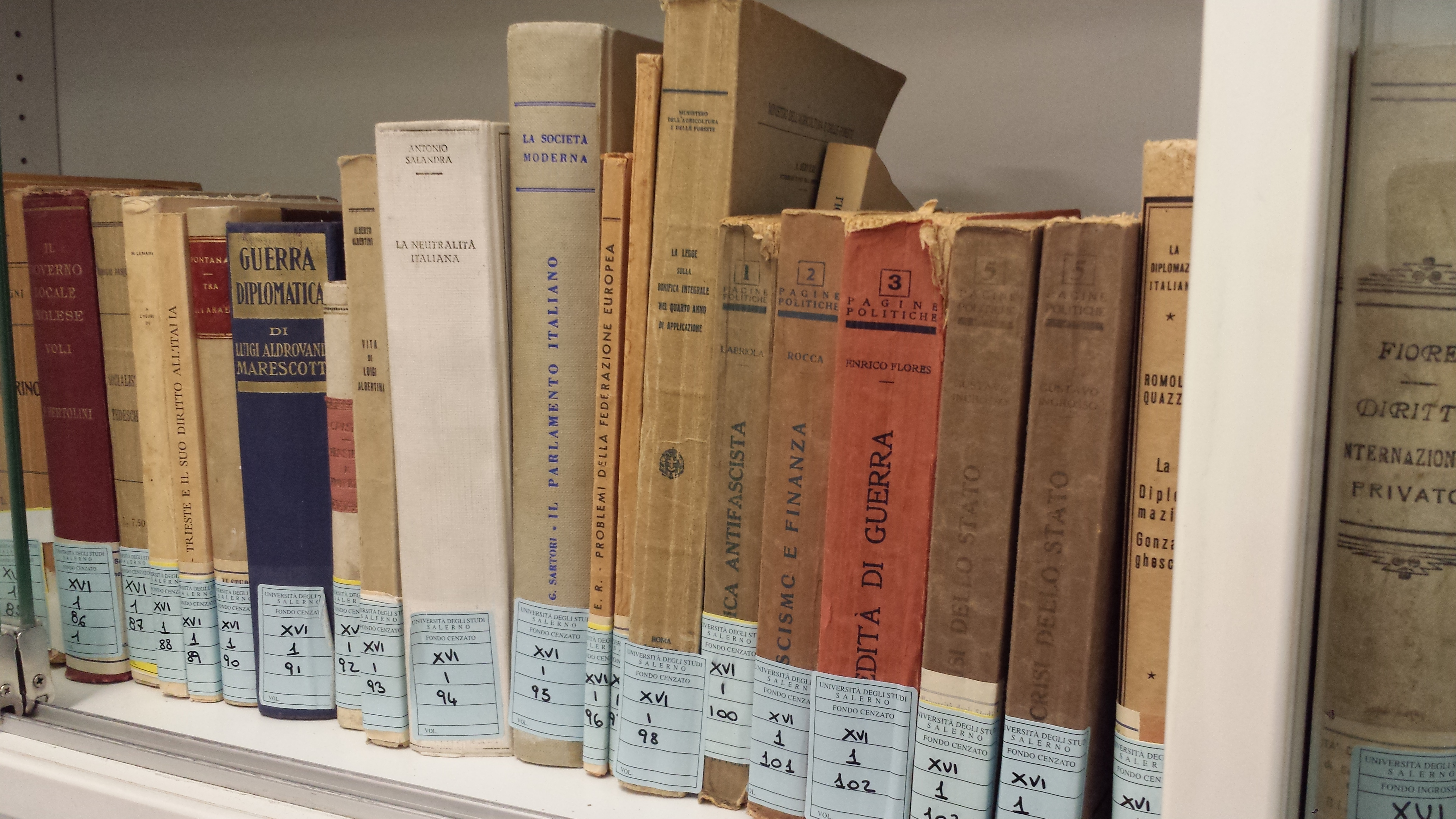 Particolare del Fondo Cenzato conservato presso la Biblioteca E.R. Caianiello dell'Università degli Studi di Salerno